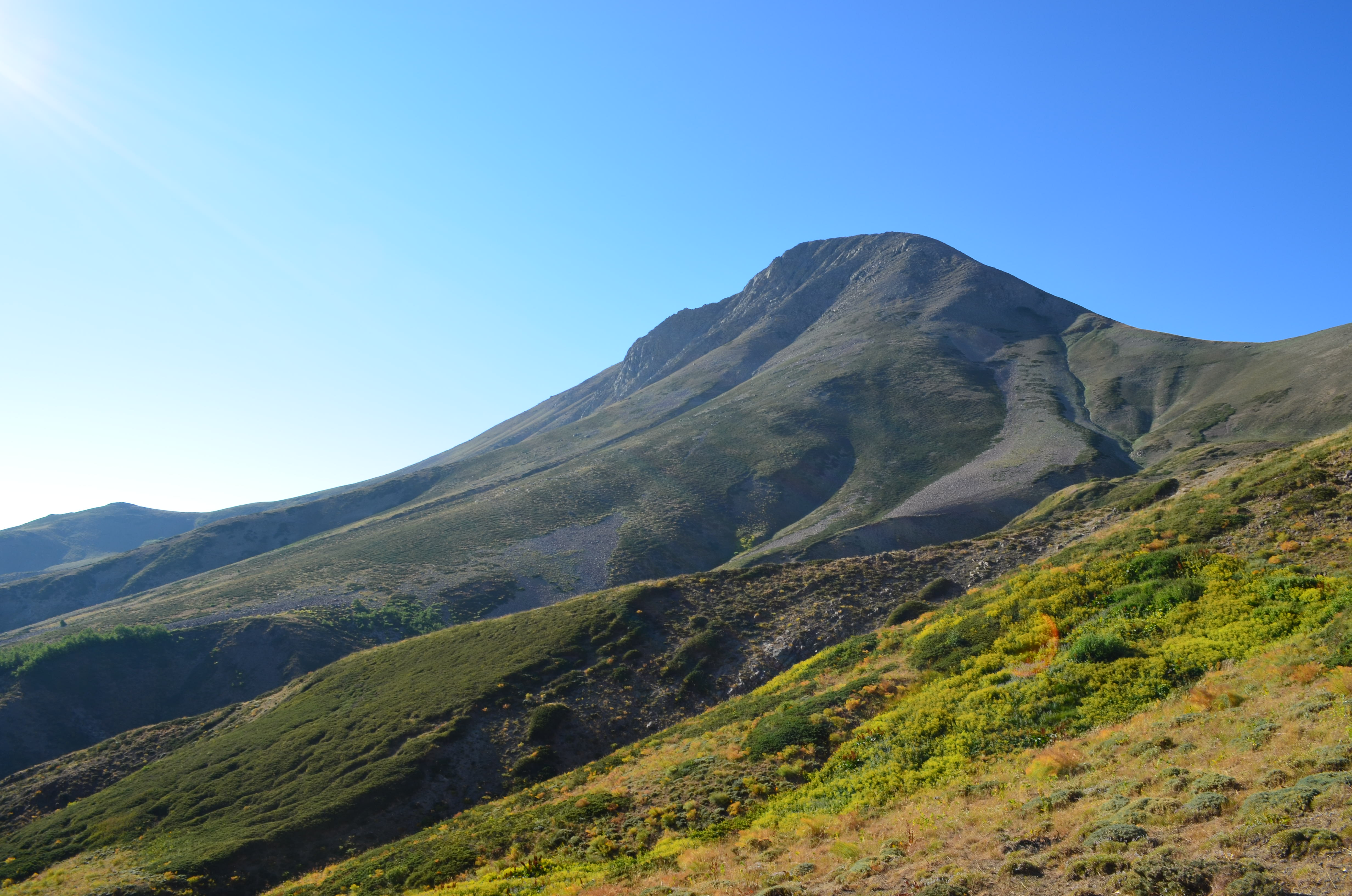 Sülbüs Dağı'nın Dersim-Cıvrak mevkiinden görünümü